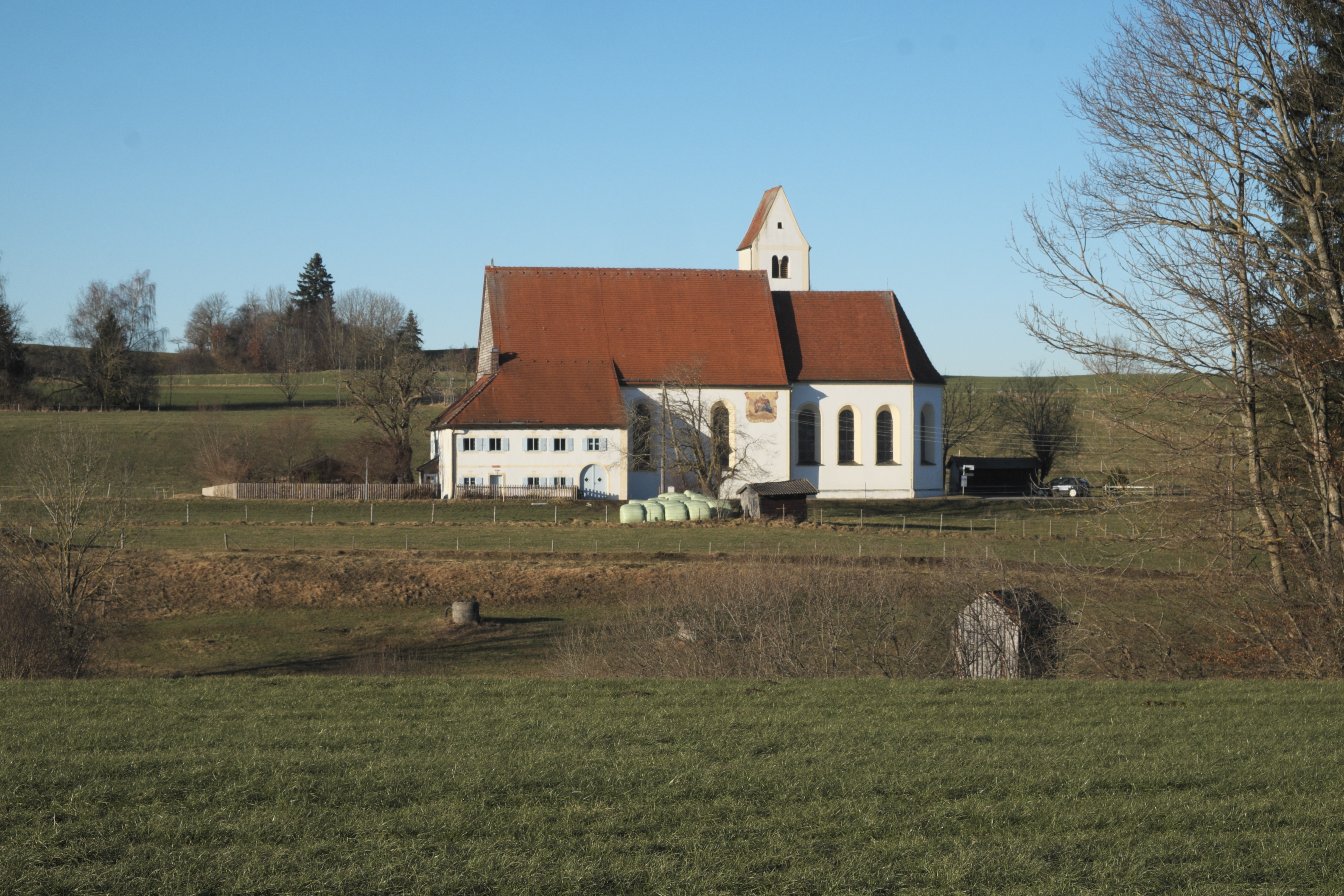 Ehemalige Wallfahrtskirche, heute katholische Filialkirche St. Anna in Burggen im oberbayerischen Landkreis Weilheim-Schongau (Bayern/Deutschland)